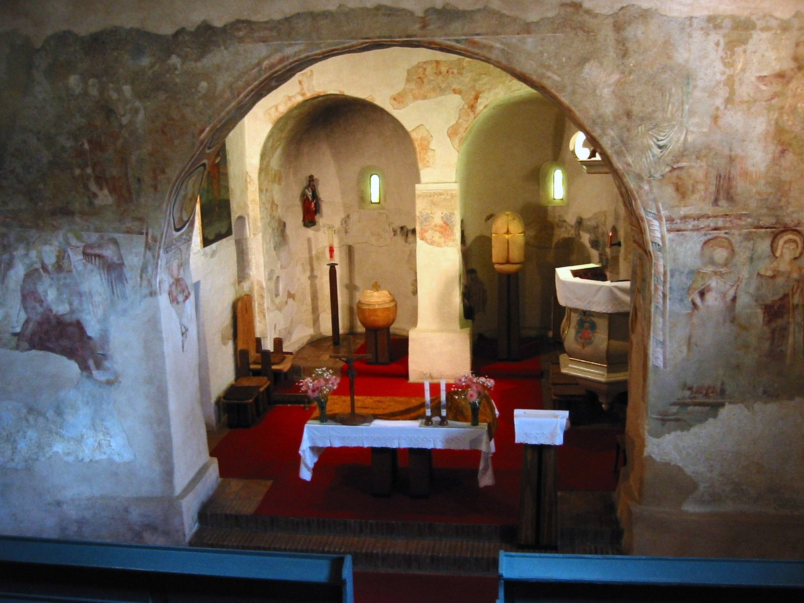 Szent András-templom. Római katolikus templom, műemléki azonosító 3289 (törzsszám 1021). Keleti része románkori, 12. sz., gótikus, 14. sz.-i bővítéssel. Az ikerszentélye egyedülálló építészeti emlék. Bővítése és faliképei 14. sz.-i. A török alatt rommá vált templom újjáépítését a XVIII. század közepén kezdték meg. Berendezése népies barokk. - Borsod-Abaúj-Zemplén m., Tornaszentandrás, Szabadság u.